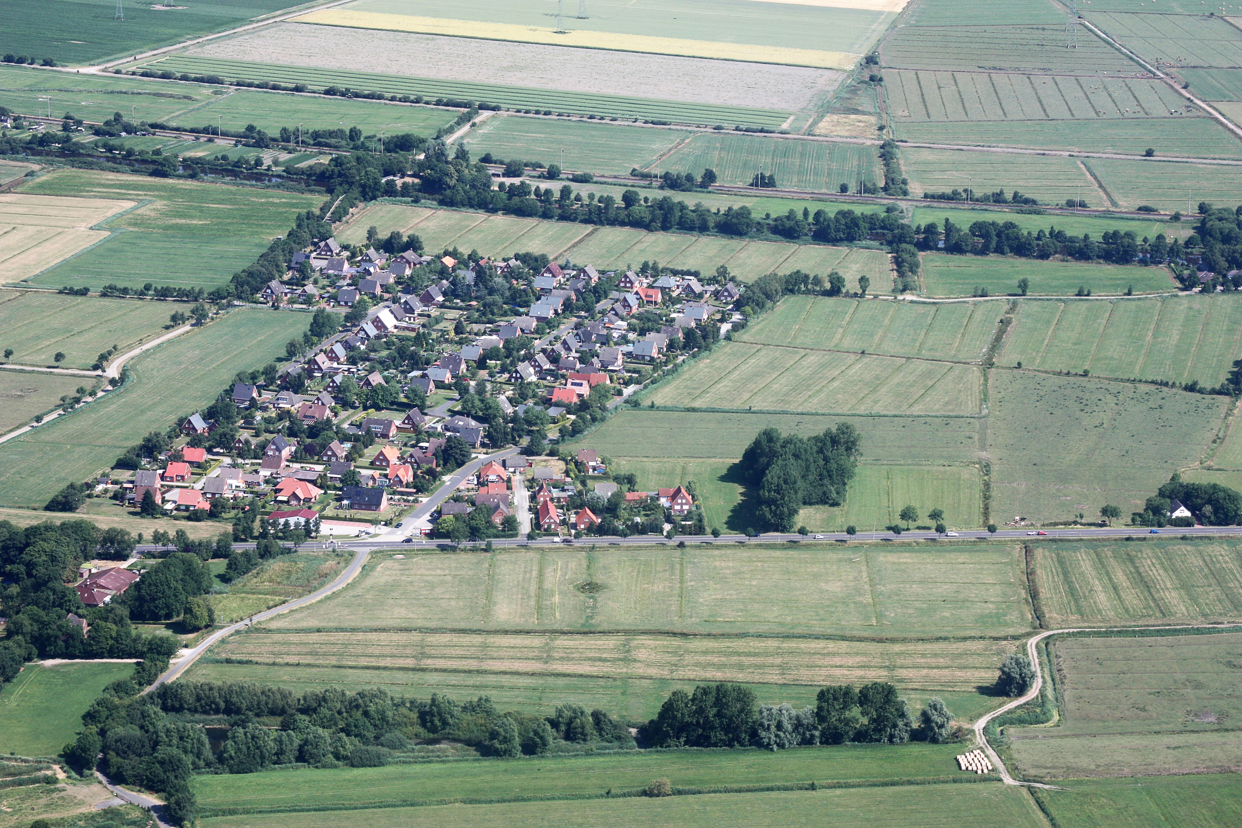 Luftaufnahme; Flug von Leer nach Emden; Flughöhe 1500 ft; Juli 2010; Originalfoto bearbeitet: Tonwertkorrektur und Bild geschärft mit Hochpassfilter